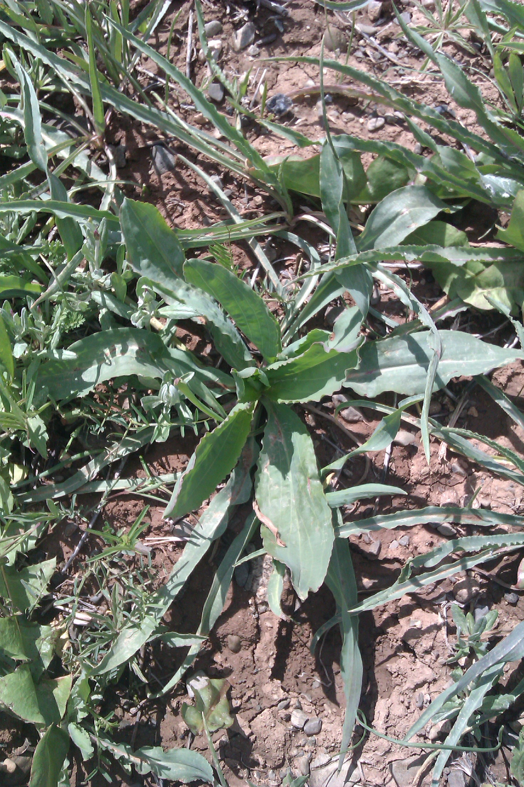 گونه های گیاهی روستای ییلاقی فرج آباد گیاه شنگه مردمان این ناحیه این گیاه را بخار پز نموده و سپس آنرا همراه با تخم مرغ و قره قروت و یا همراه با تن ماهی سرخ نموده وبه عنوان وعده غذایی از آن استفاده مینمایند